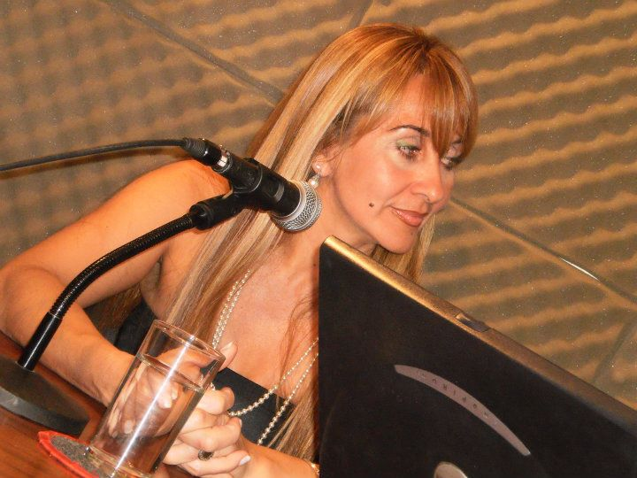 Mónica Ferrari (n. Posadas, Argentina, 26 de agosto de 1965 - m. Posadas, Argentina, 7 de noviembre de 2013) fue una conductora radial argentina, con muchos años de presencia e importancia en los medios radiales y televisivos de su provincia.